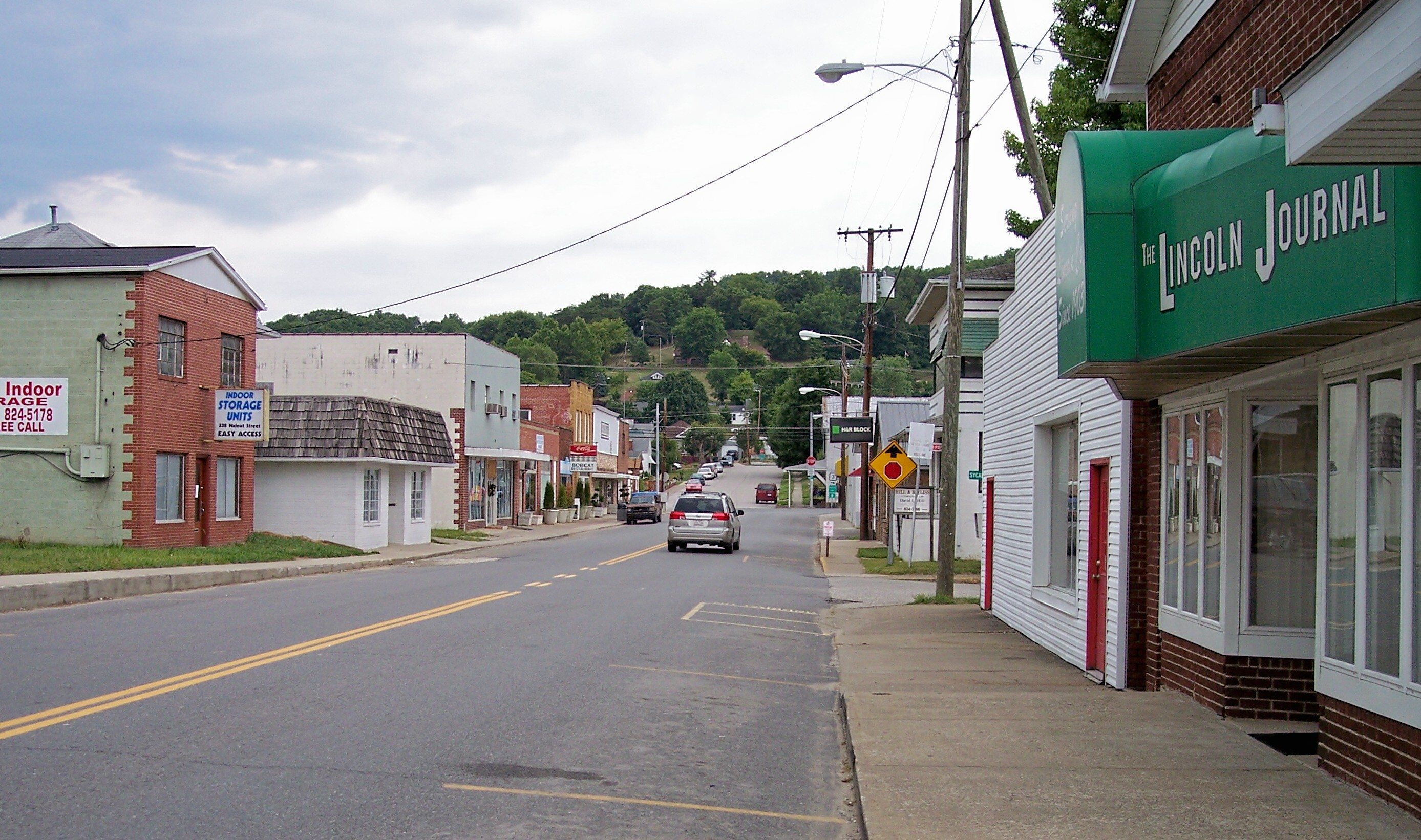 Walnut Street (West Virginia Route 3) in Hamlin, West Virginia.